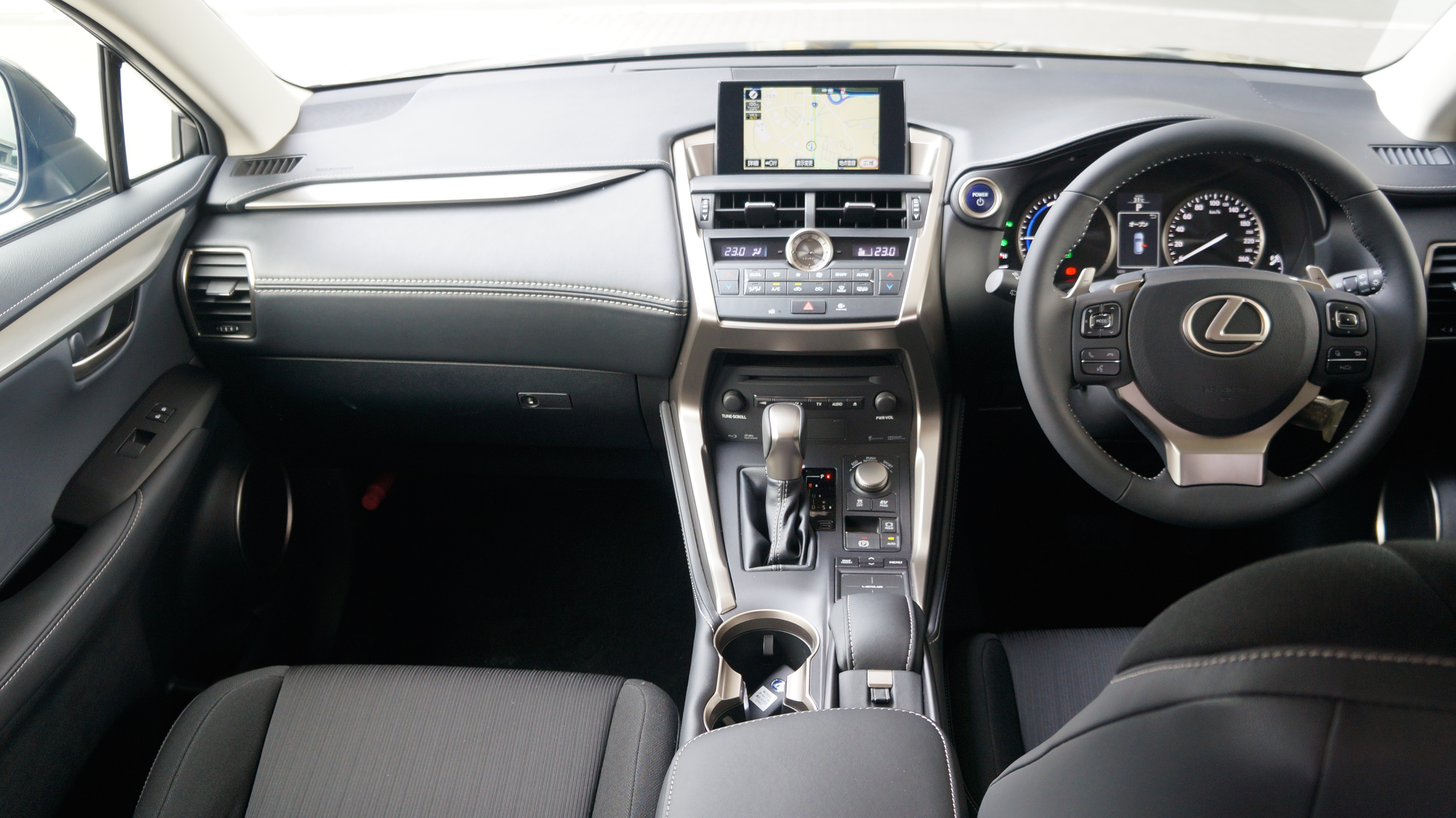 LEXUS NX300h Japan 2014 Interior